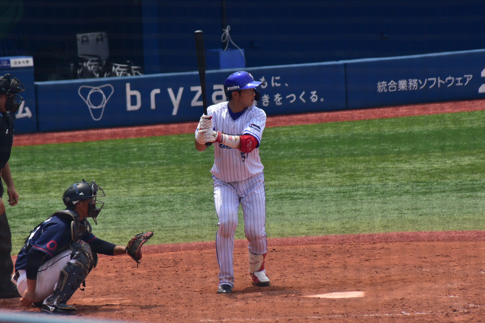 横浜 DeNAベイスターズ背番号50 山本祐大選手。